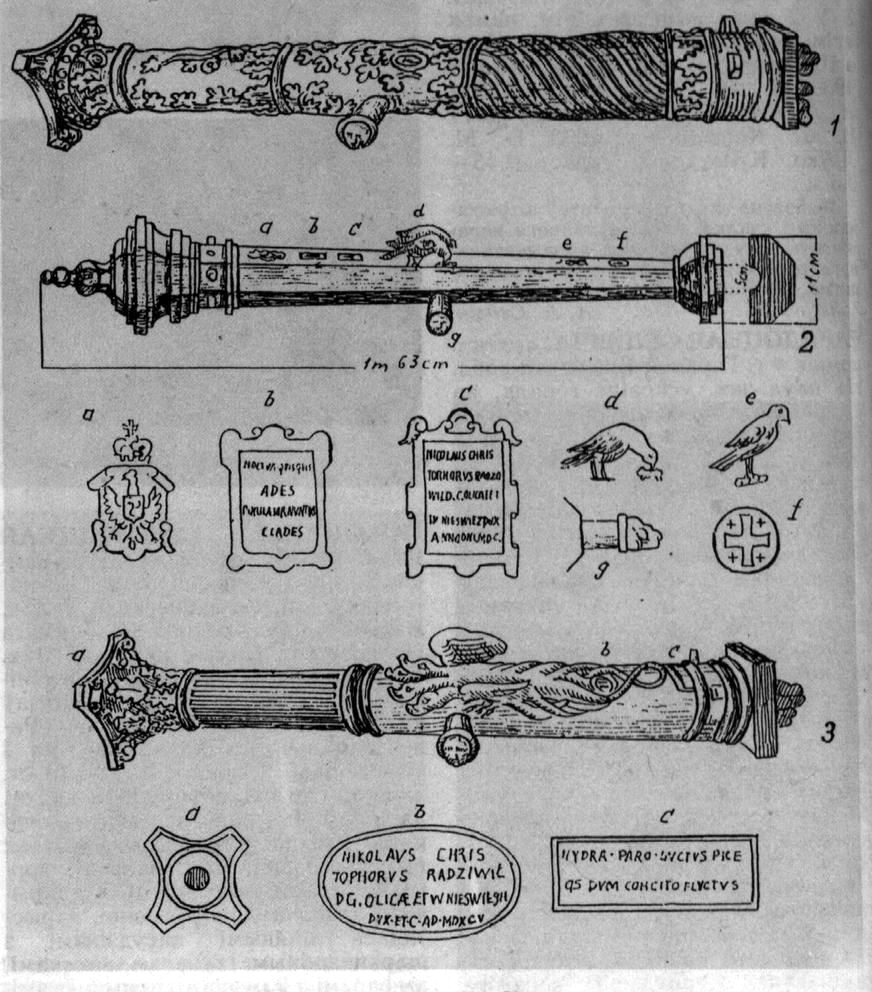 Гарматы з Нясвіжскага замка, XVI - XVII ст. / АІНБ, с. 164.